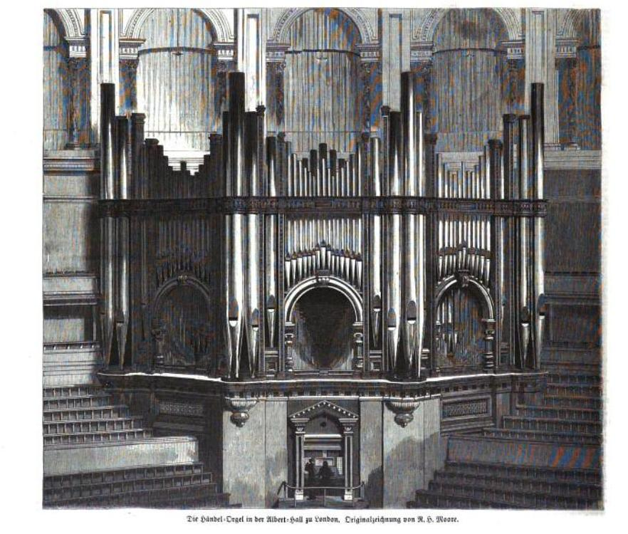 Zeichnung der Orgel in der Royal Albert Hall bei ihrer Installation 1871